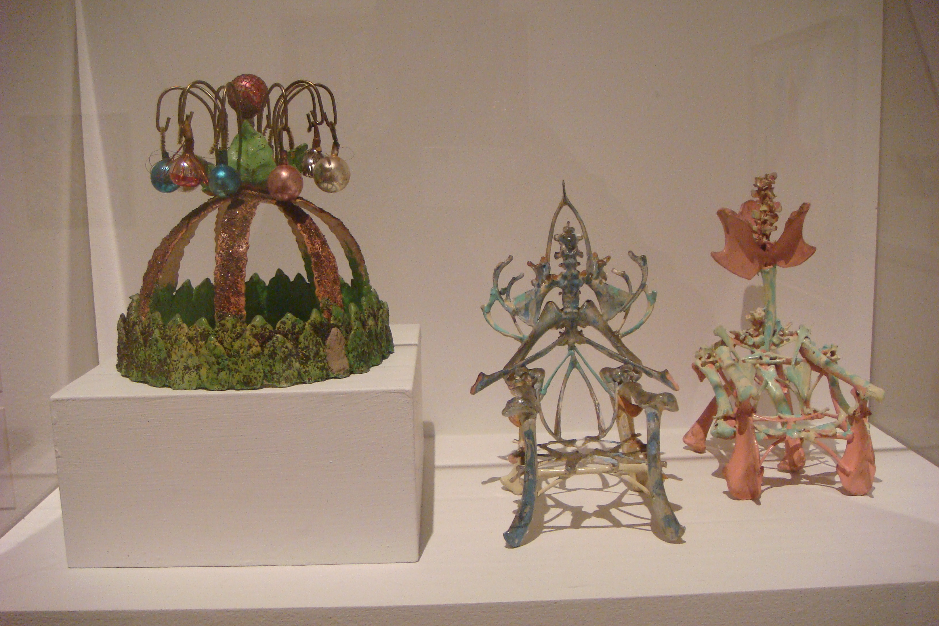 Milwaukee Art Museum